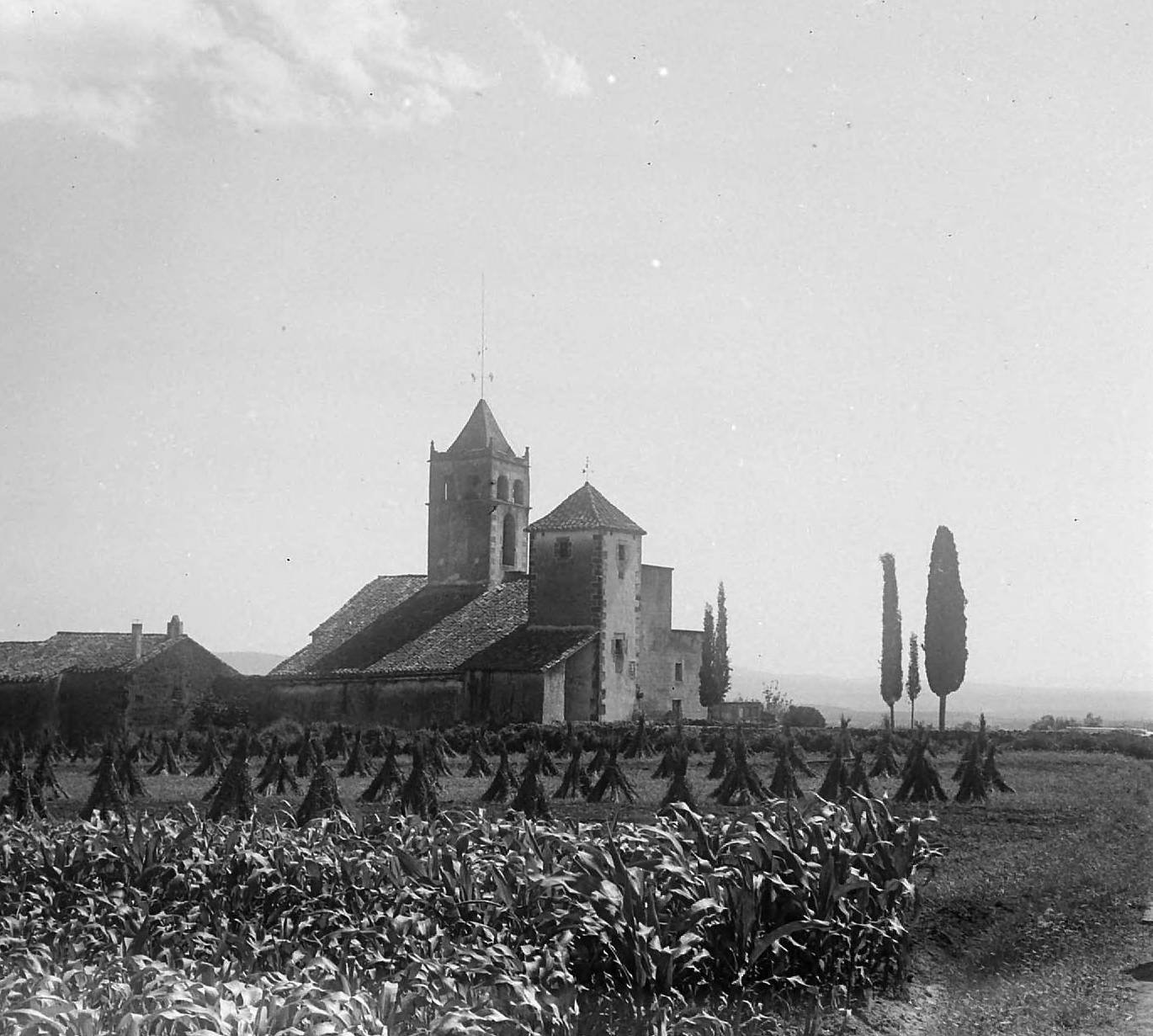 Vista exterior de l ' església de Sant Vicenç de Canet d ' Adri (és romànica i del segle XI) .